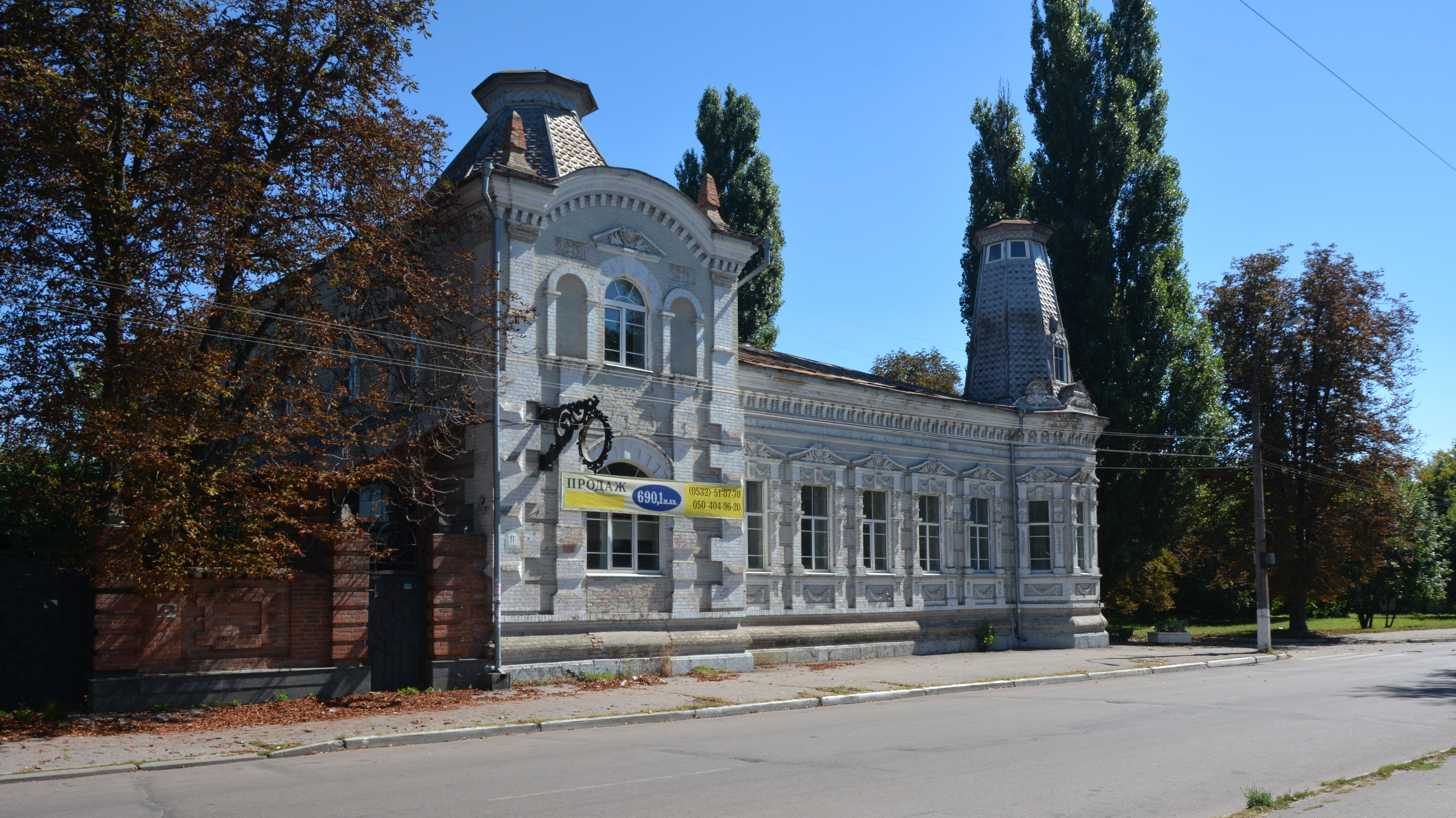 Будинок купця Чуркіна, Кременчук, Вул. І. Приходька, 43/13